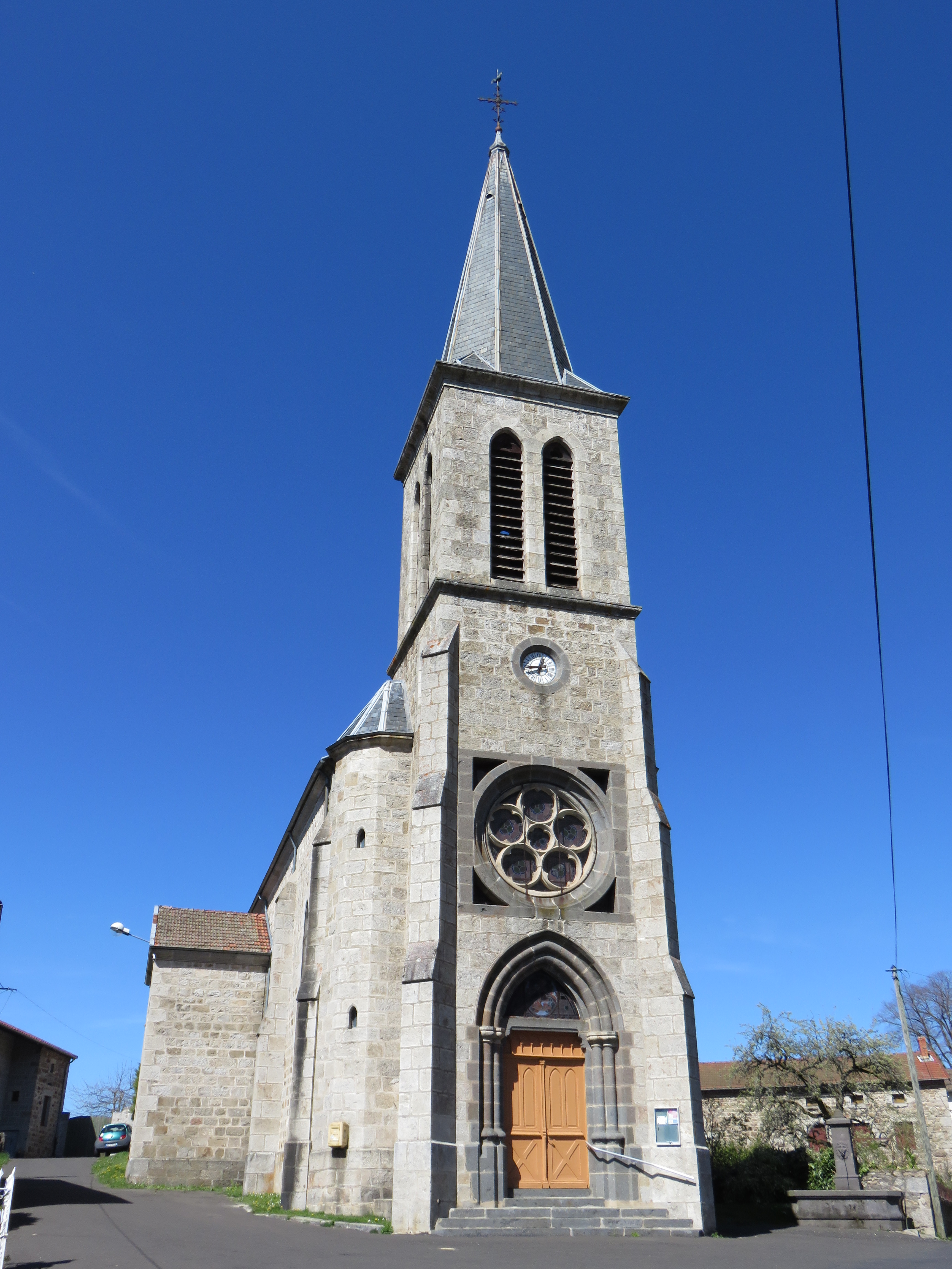 Église Saint-Nicolas de Baffie, dans le Puy-de-Dôme.